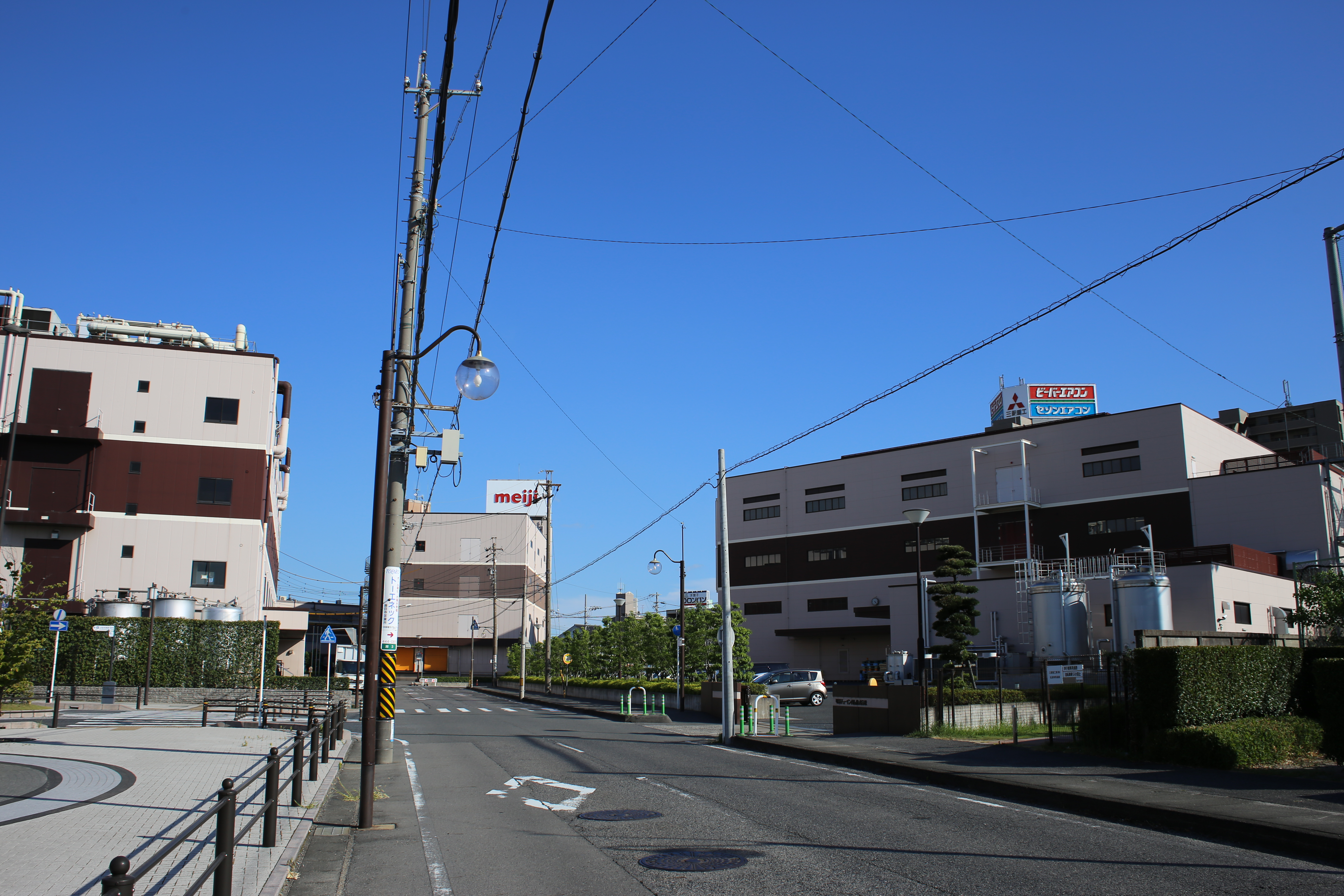 愛知県清須市の明治チューイングガム本社を北側公道より撮影